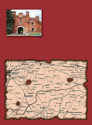 Подборка фотографий об А.Б.Михайловском